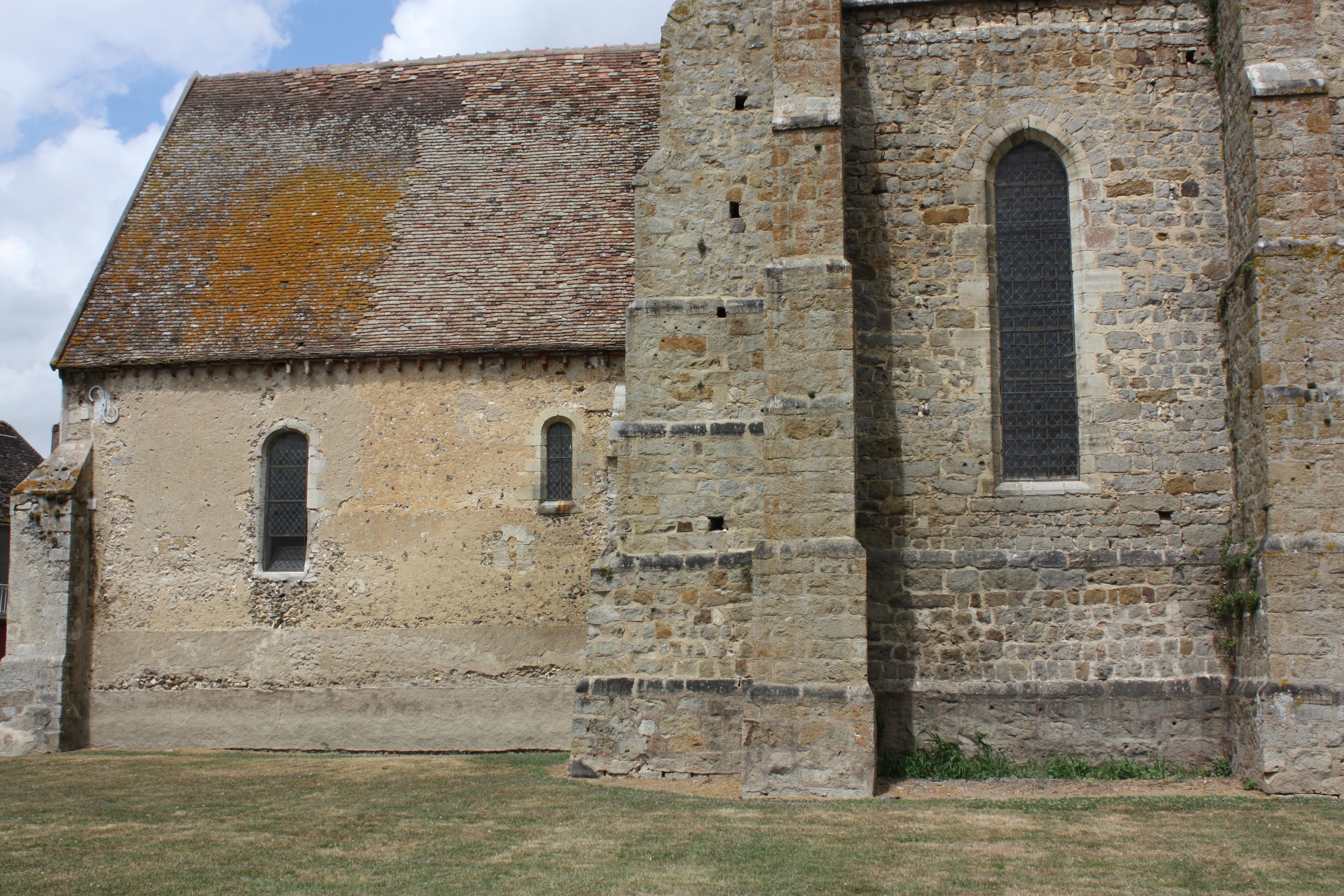 Mur Sud de la nef d'origine romane